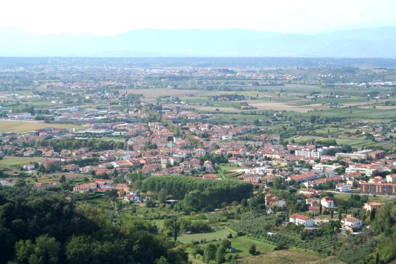 Autore Prof.Quatermass, foto del 19.08.2007 mediante EOS 350 D con obbiettivo 18/55